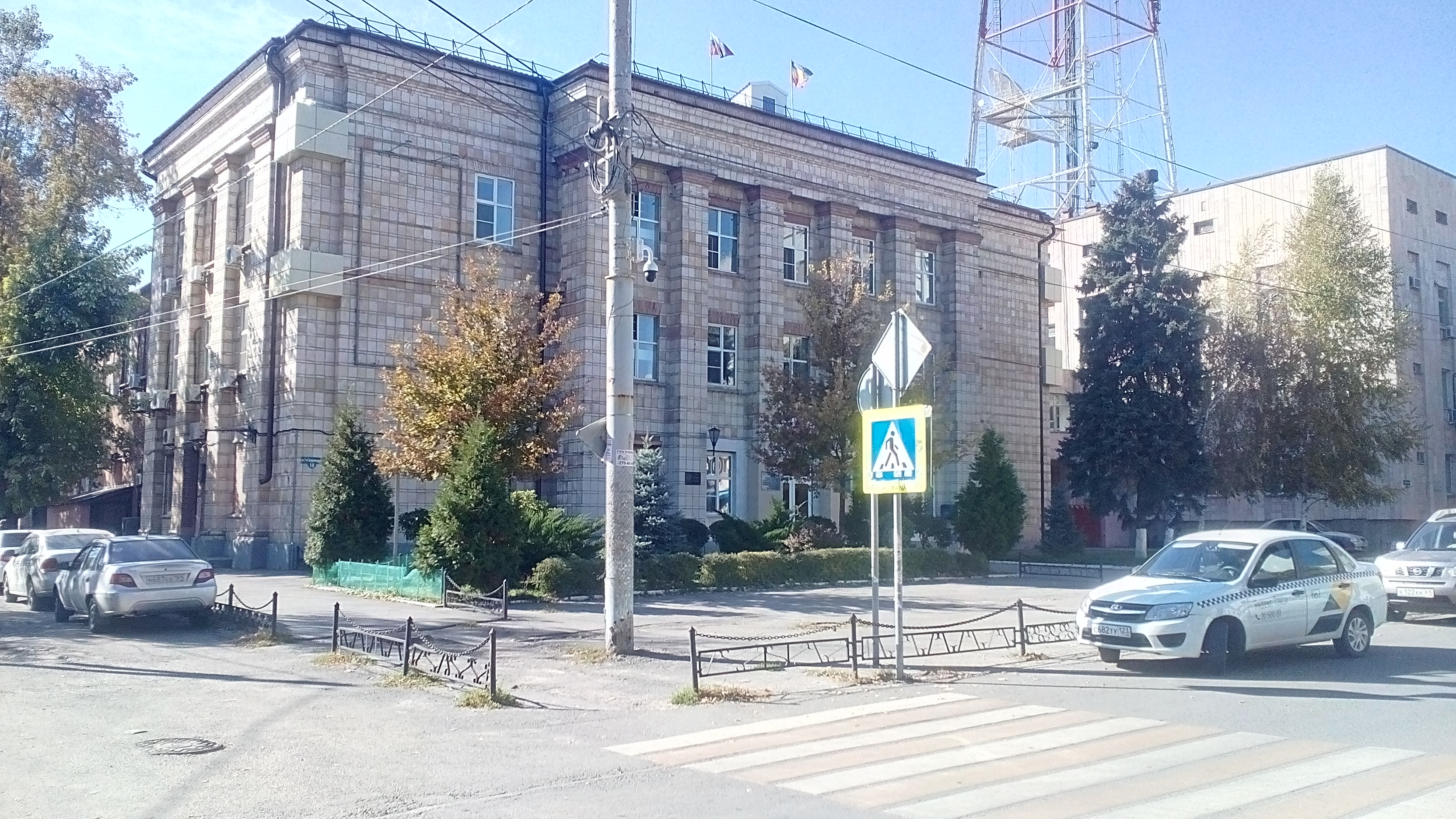 Ростов-на-Дону, телекомпания "Дон-ТР"